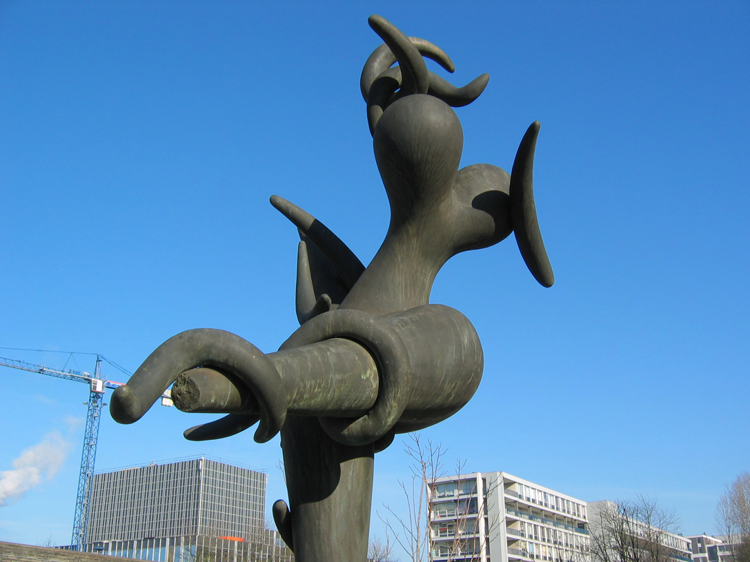 De Duikster, bronzen beeld gemaakt door Theo Lenartz. Het staat in Valkenstaete, Heerlen (NL).